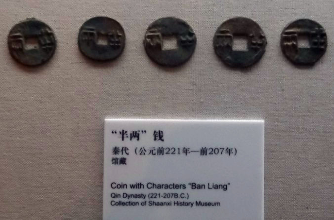 ，拍摄于陕西历史博物馆